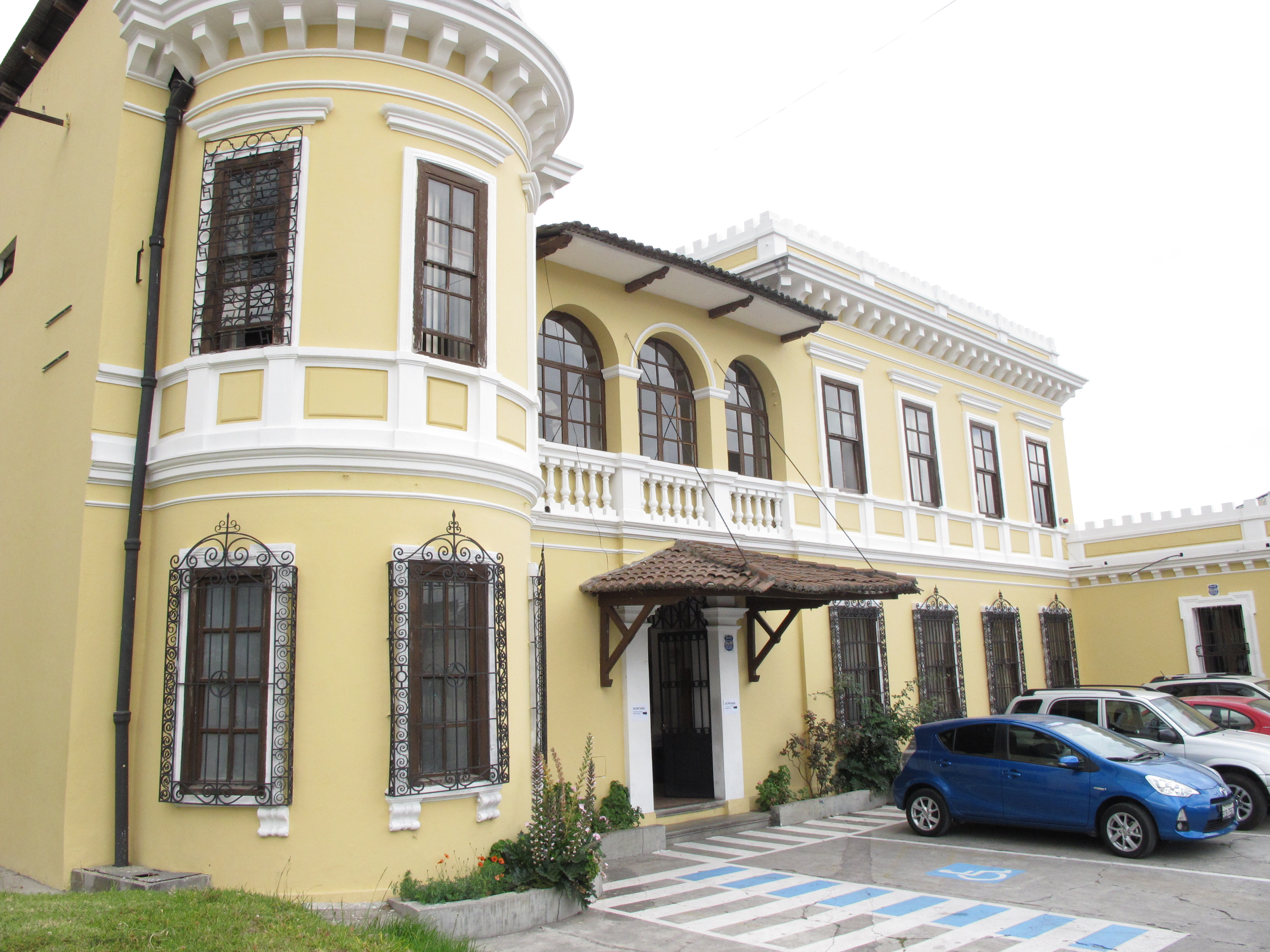 Facultad de Ciencias Administrativas, Faculty Building Escuela Politécnica Nacional Quit, Ecuador.